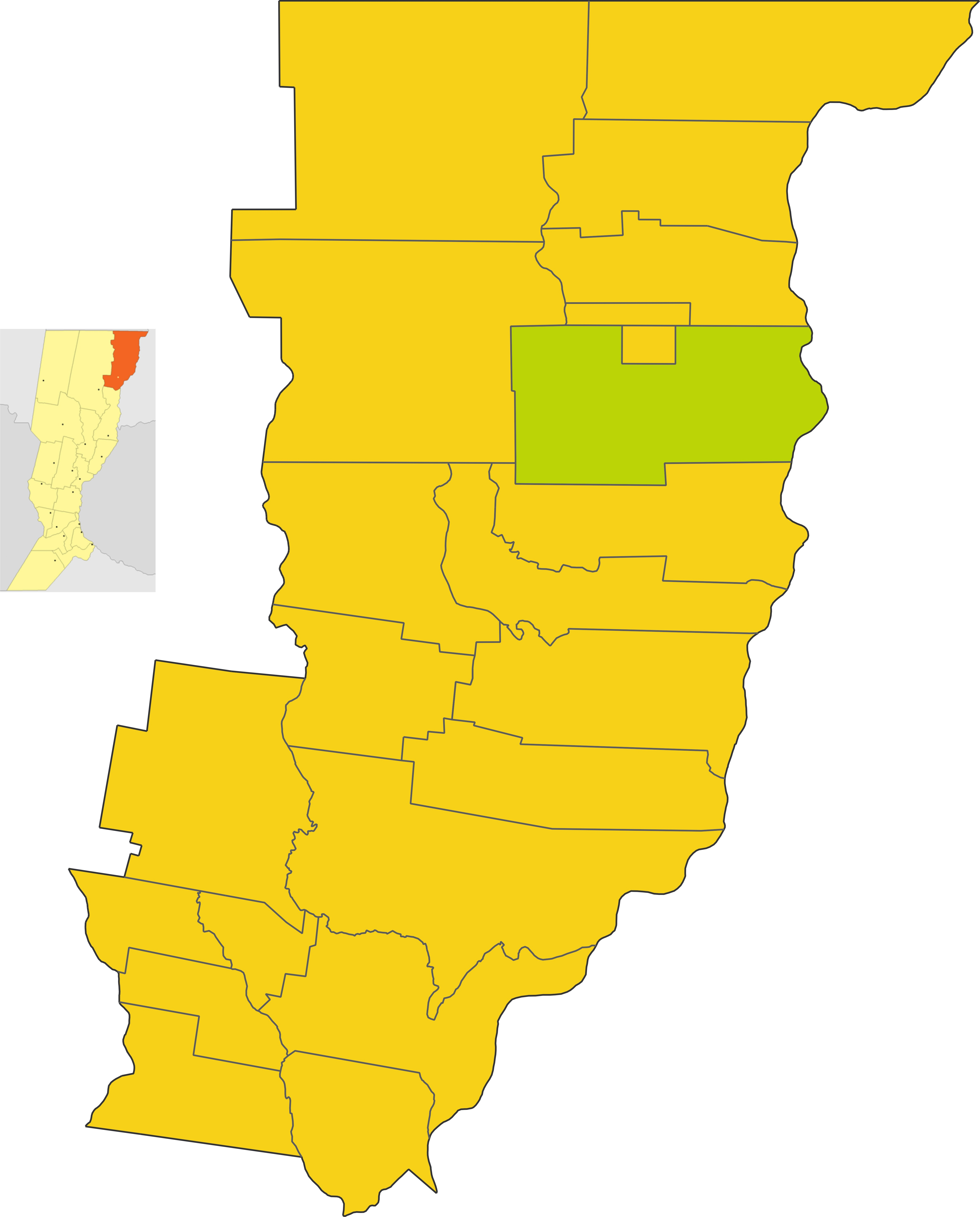 Map of the municipio de Villa Ocampo in General Obligado department, Santa fe province, Argentina